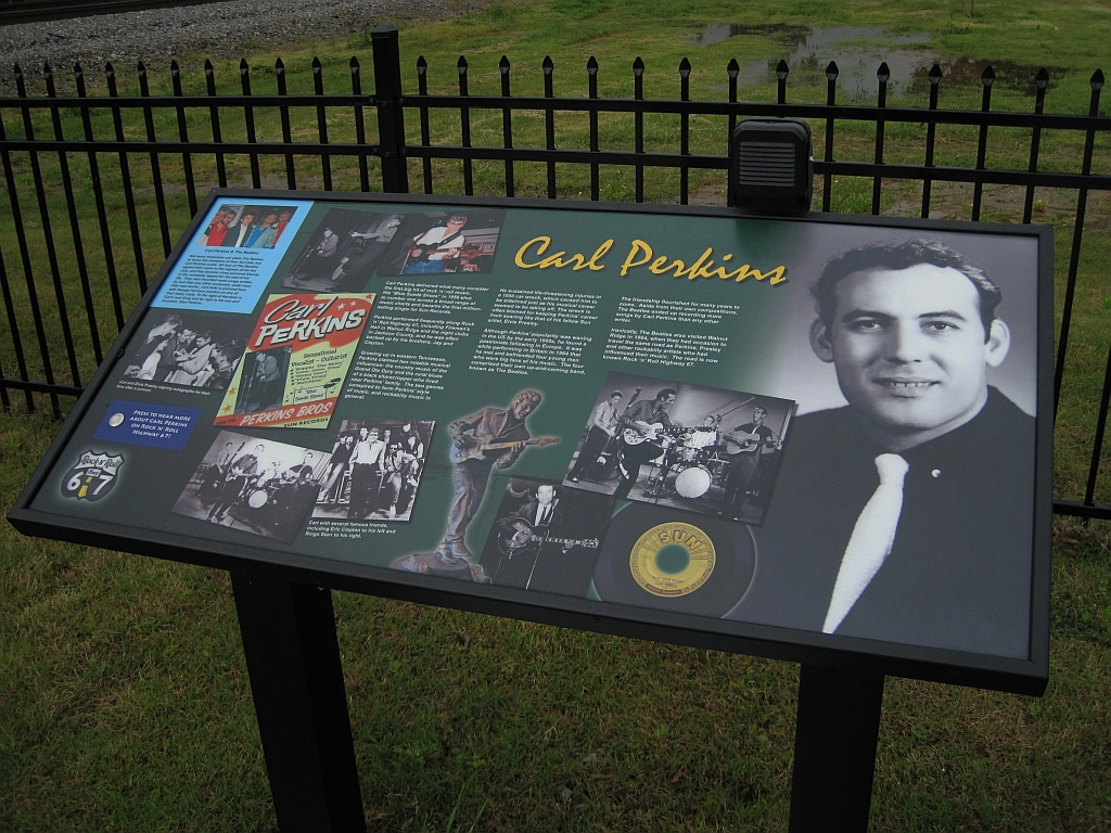 Cavenaugh Park in Walnut Ridge, Arkansas Carl Perkins